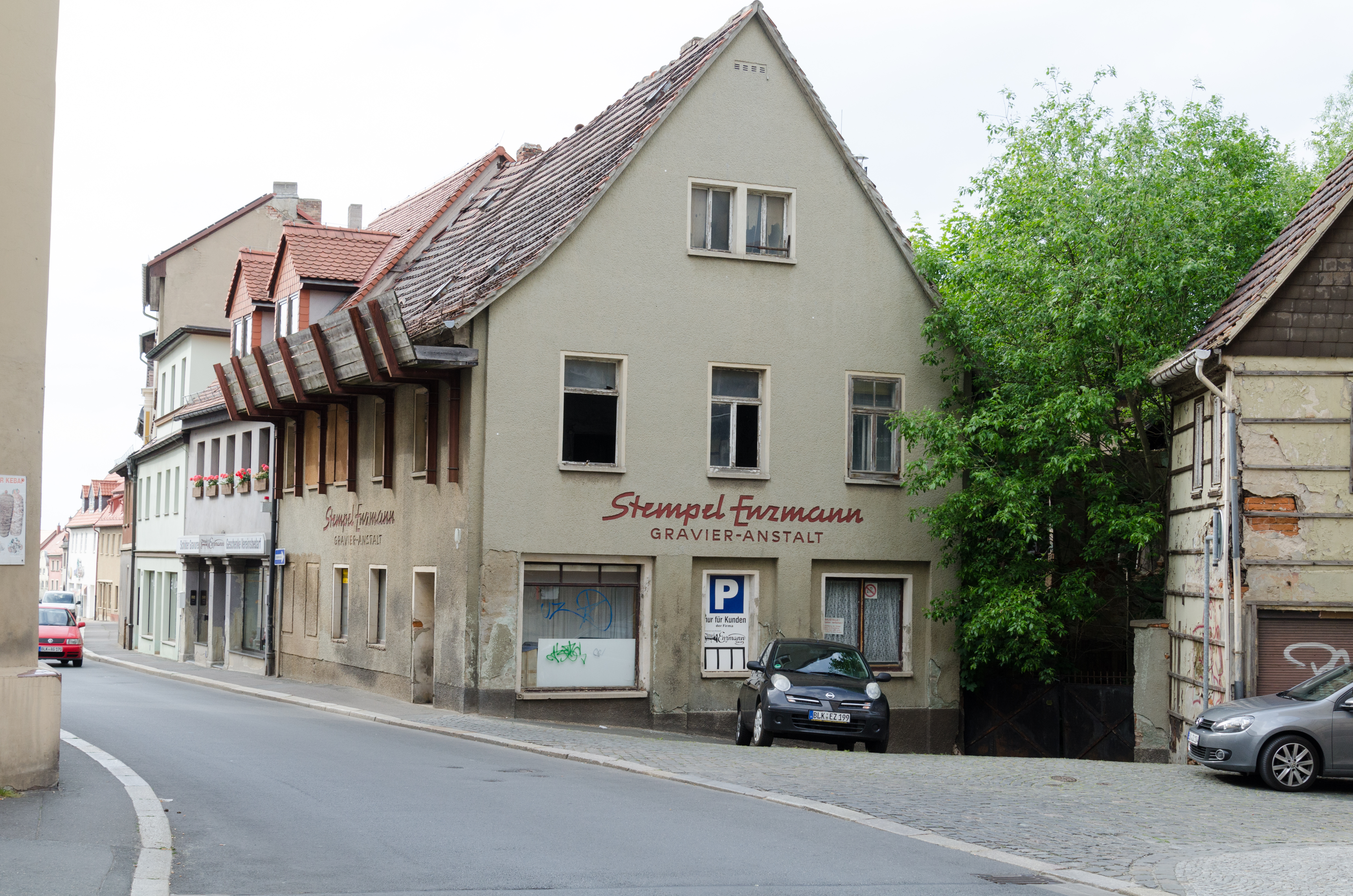 Zeitz, Kalkstraße 25, 24